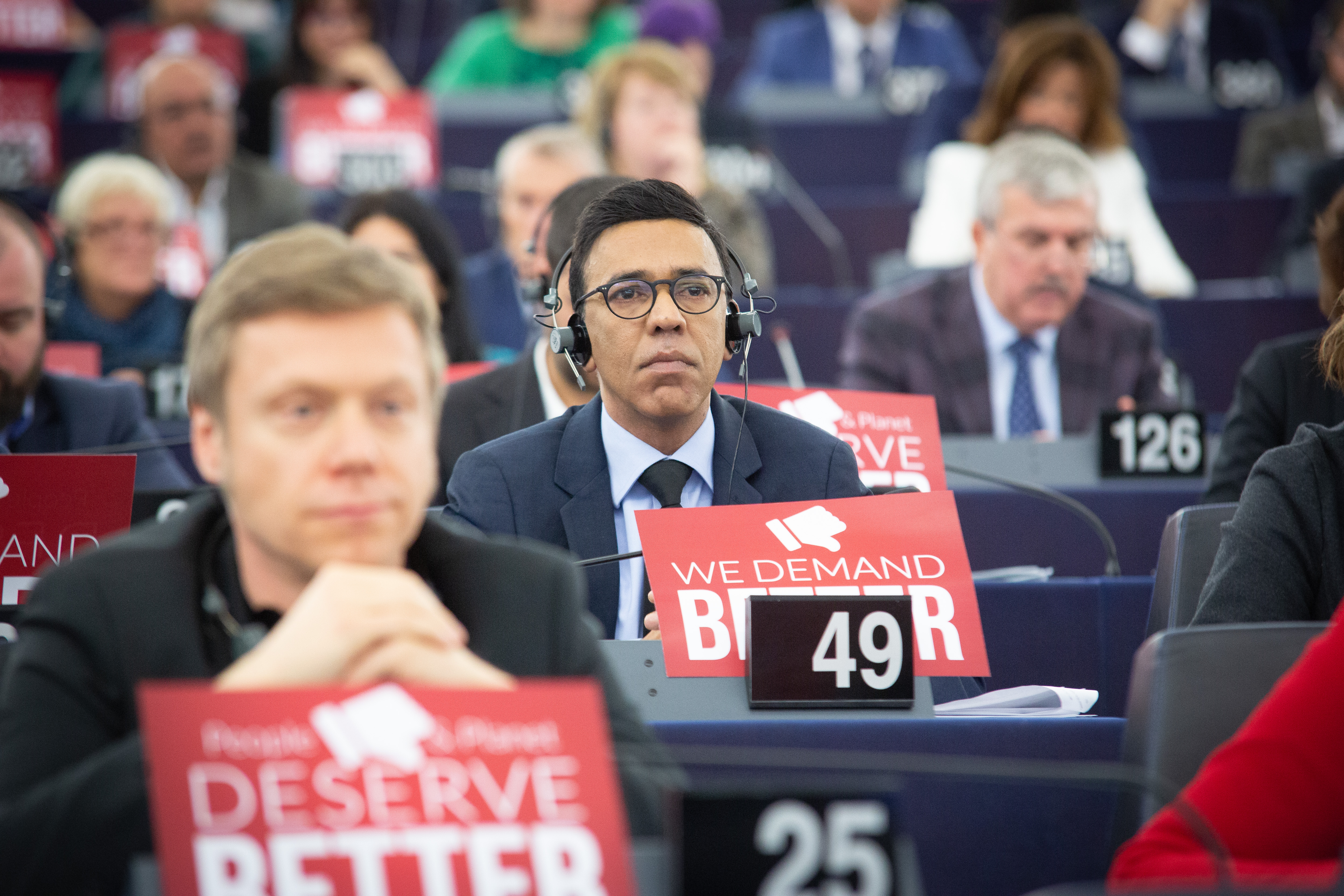 F70A6083